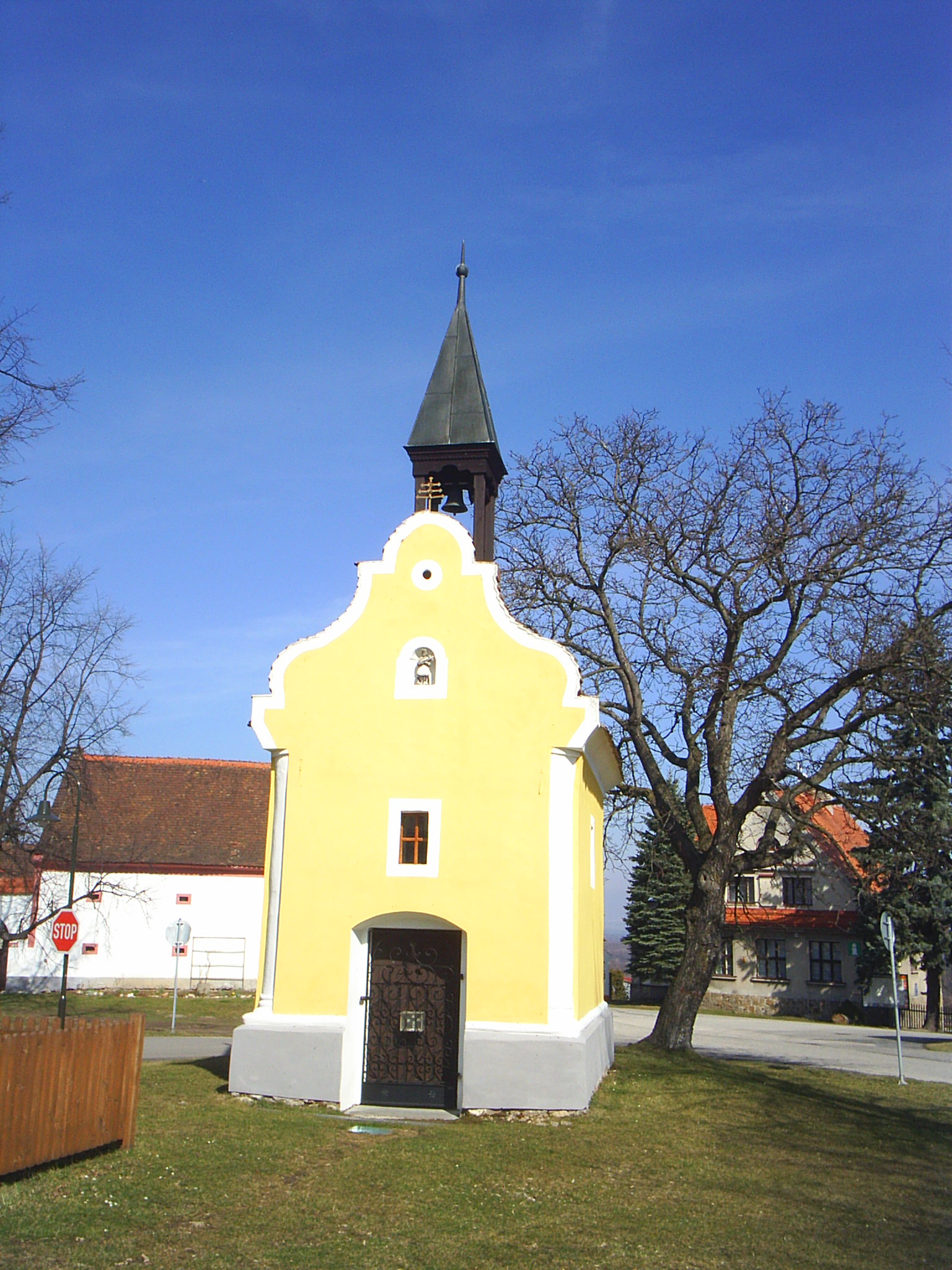 Holašovice-kaple na návsi